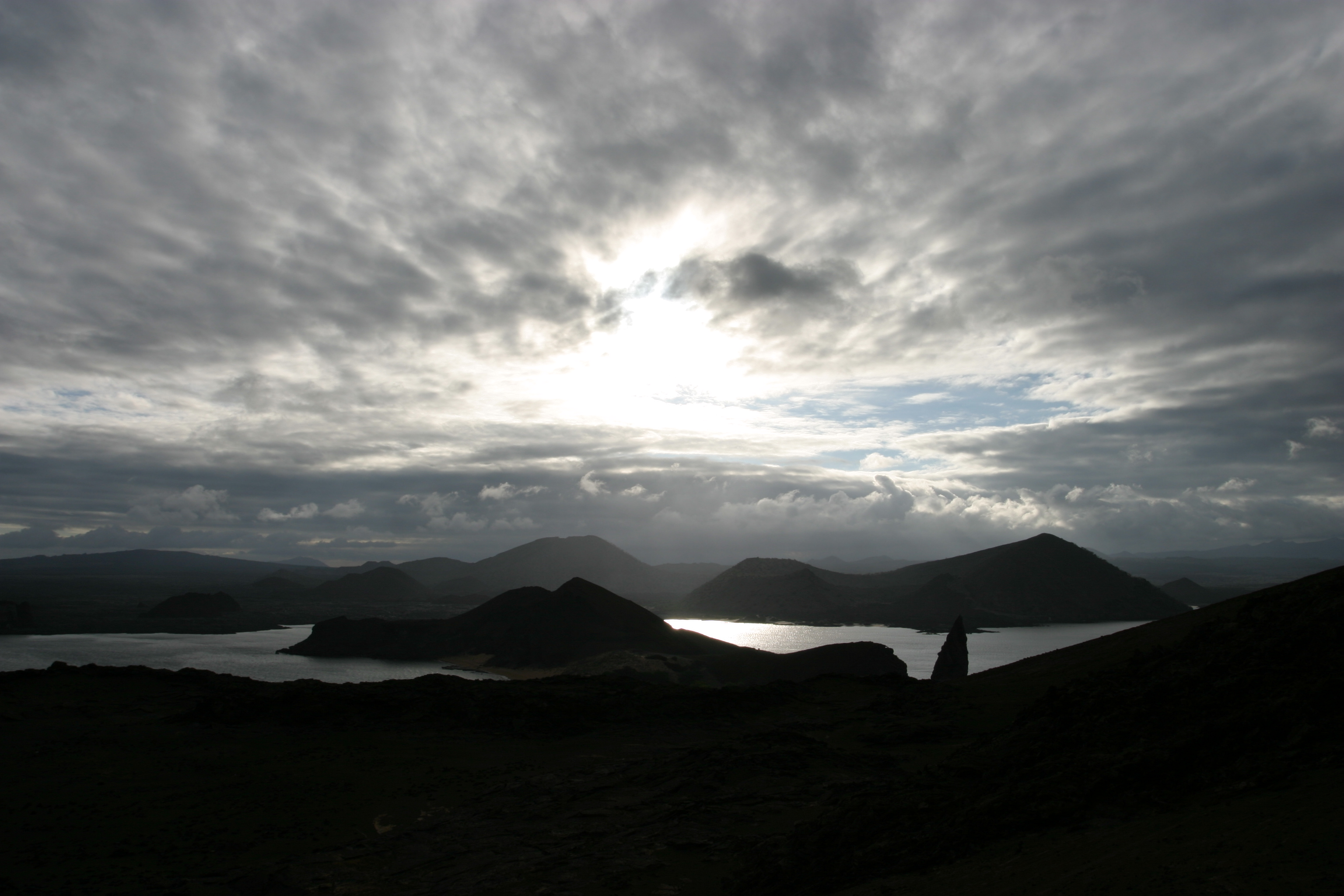 sky